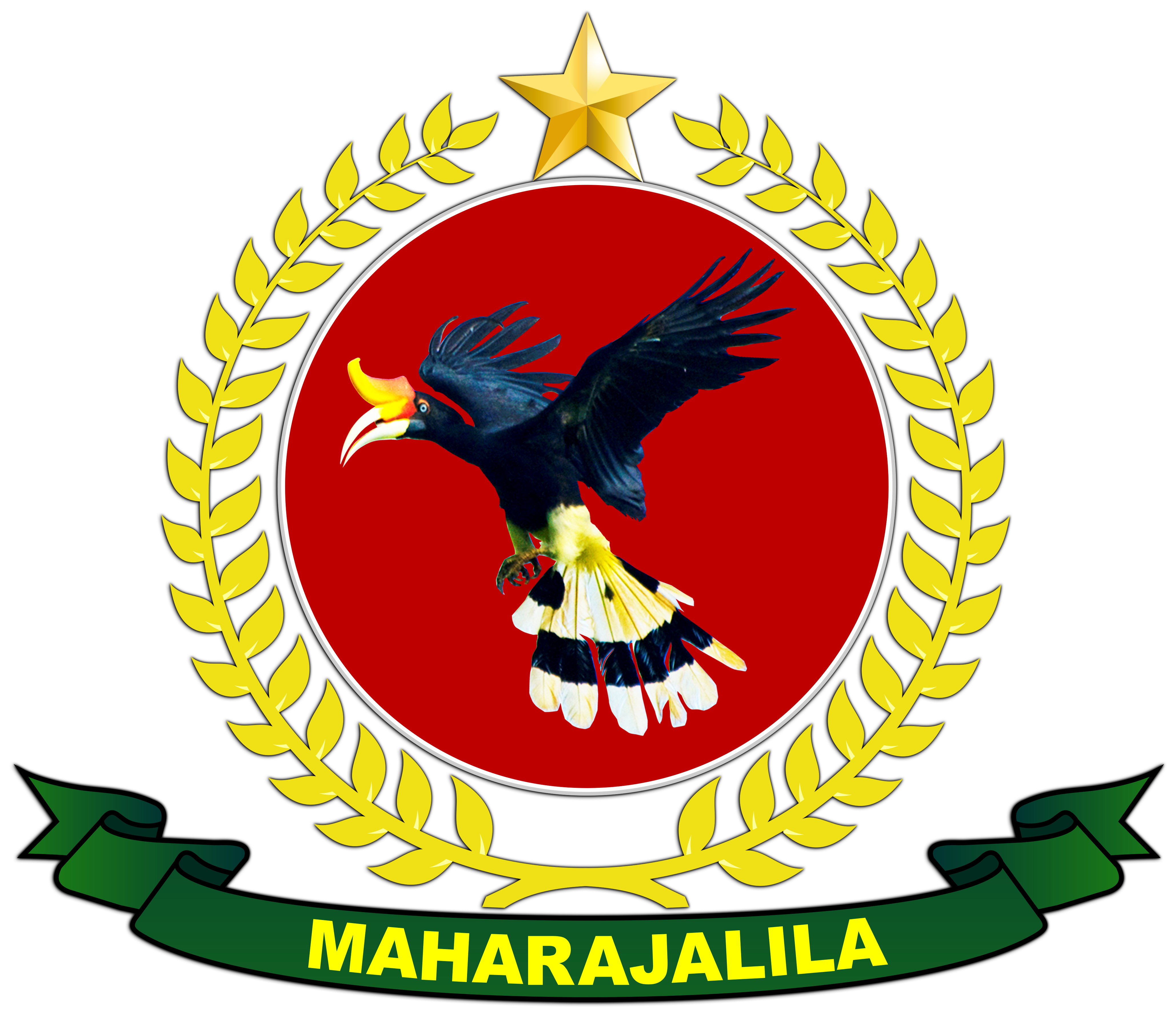 LAMBANG KOREM 092 MAHARAJALILA